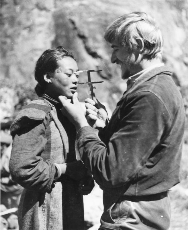 Tibetexpediton, Anthropometrische Untersuchungen Lachen, Beger als Zahnarzt (anthropologische Messung) [Anthropometrie, Kraniometrie] Abgebildete Personen: Beger, Bruno Dr.: SS-Hauptsturmführer, Abteilungsleiter Sven-Hedin-Institut, Deutschland (GND 128720654)